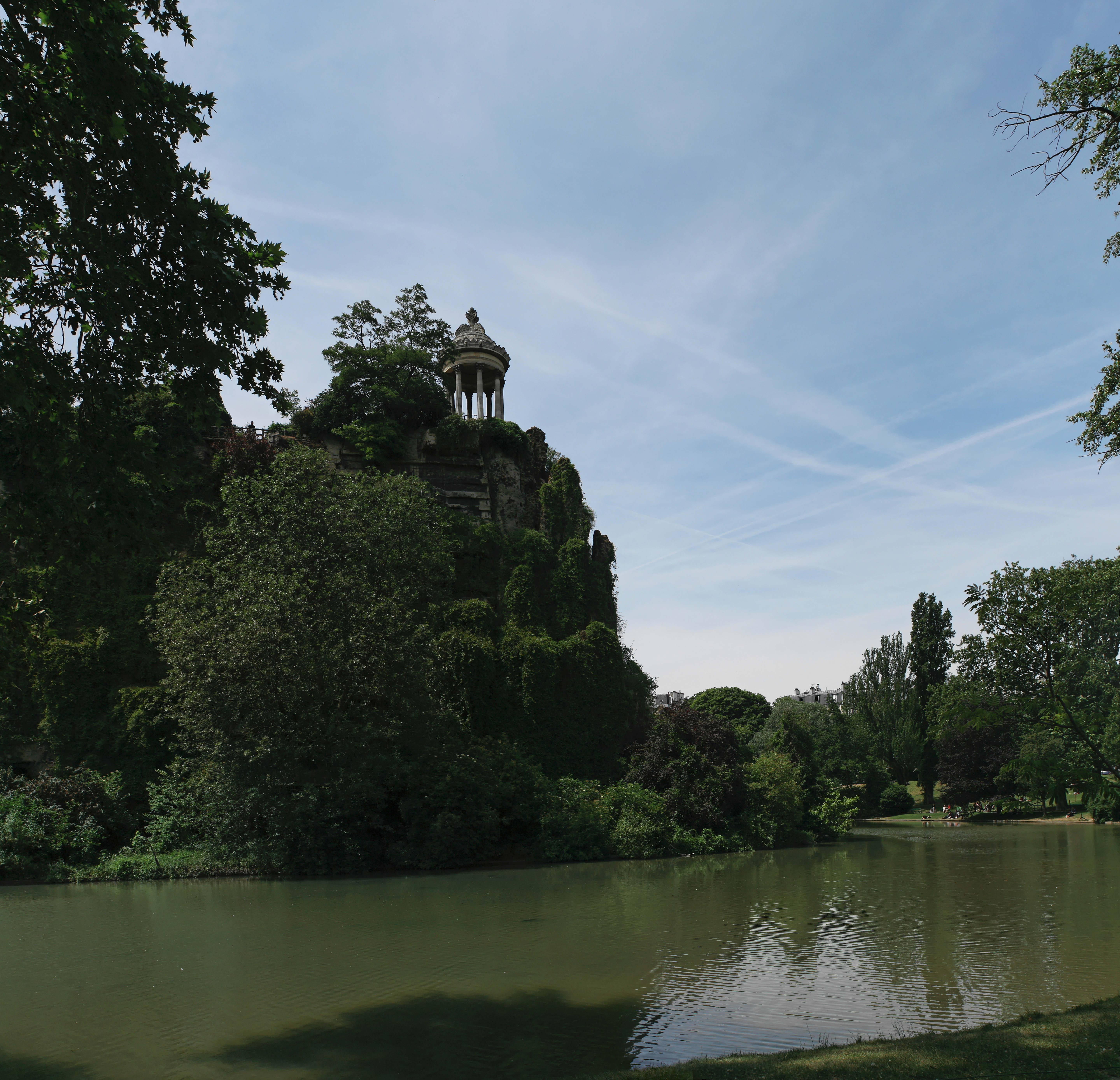 Paris, parc des Buttes-Chaumont. Vue du lac ; à gauche, l'île du Belvédère